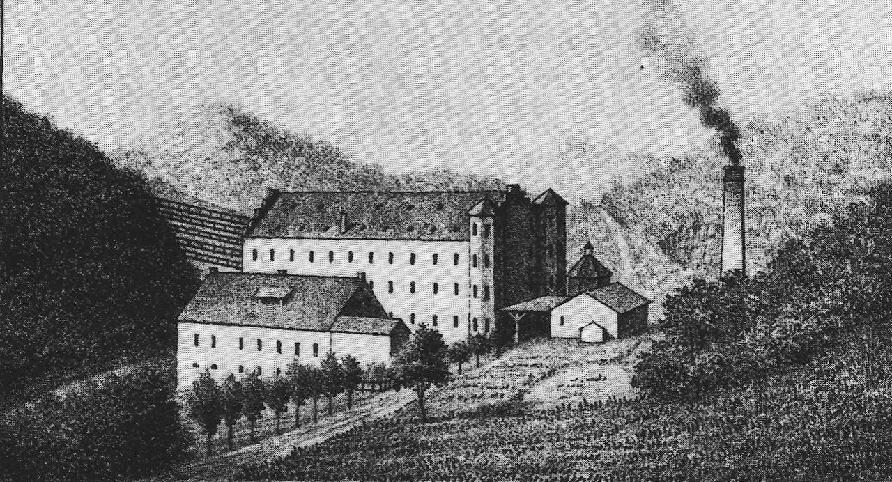 Das Bild zeigt die Tuchfabrik C+F Schnabel im 19. Jahrhundert, Hummeltenberger Mühle, Kretzer Loch, Hückeswagen.